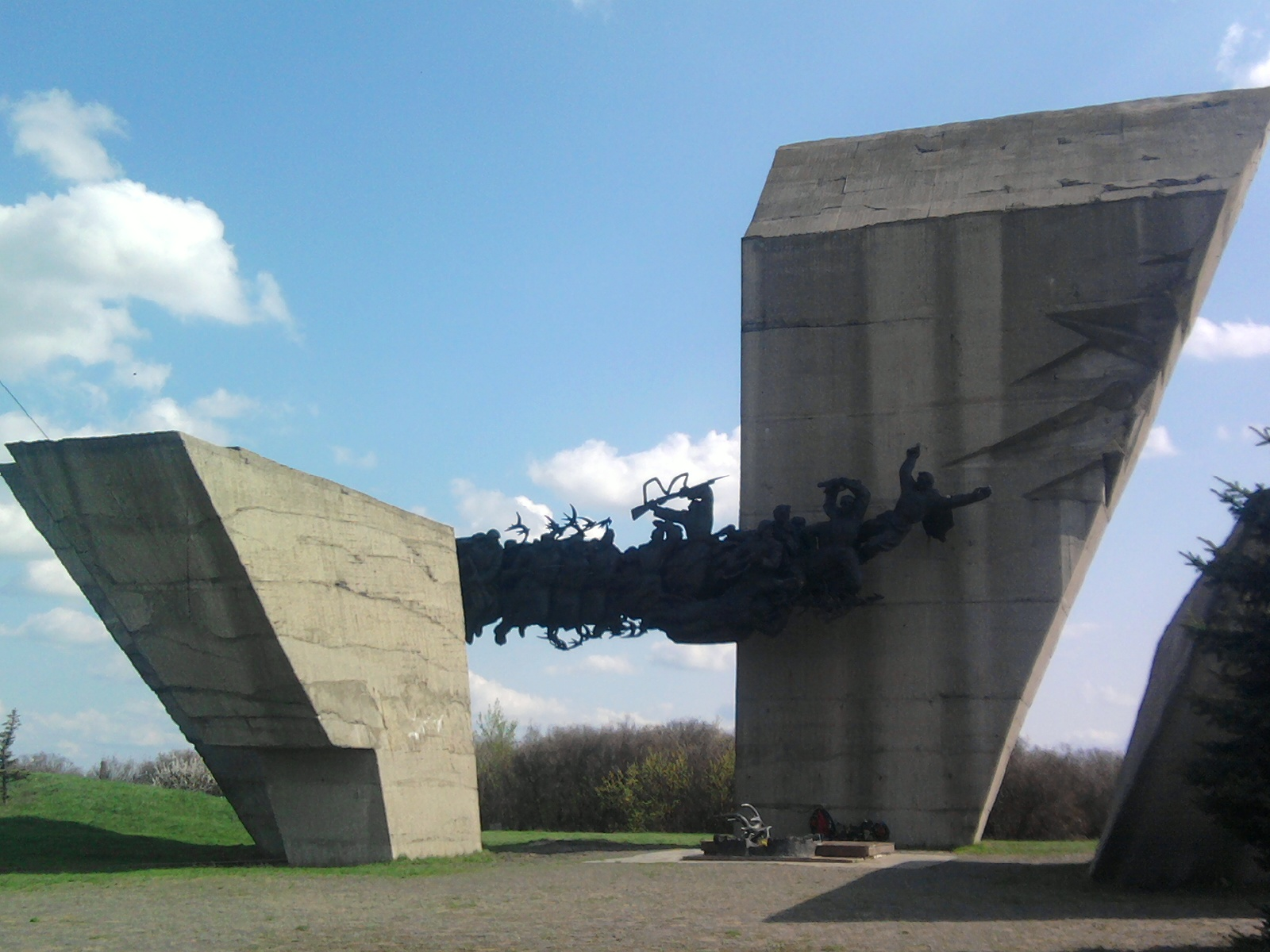 Меморіал до 40-річчя Перемоги у Великій Вітчизняній війні в місті Ізюм Харківської області